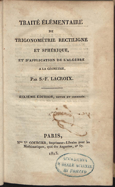 Frontespizio